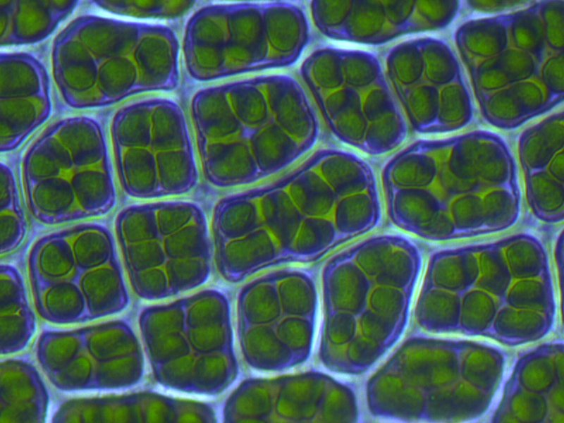 Schwanenhals-Sternmoos (Mnium hornum), Laminazellen, Vergrößerung: 400x, Rostock